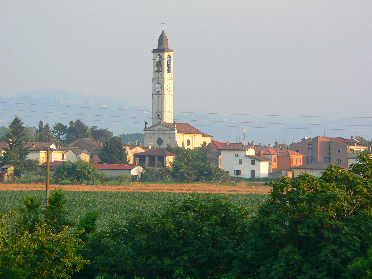 Verrua Po, il centro visto dall'argine del Po